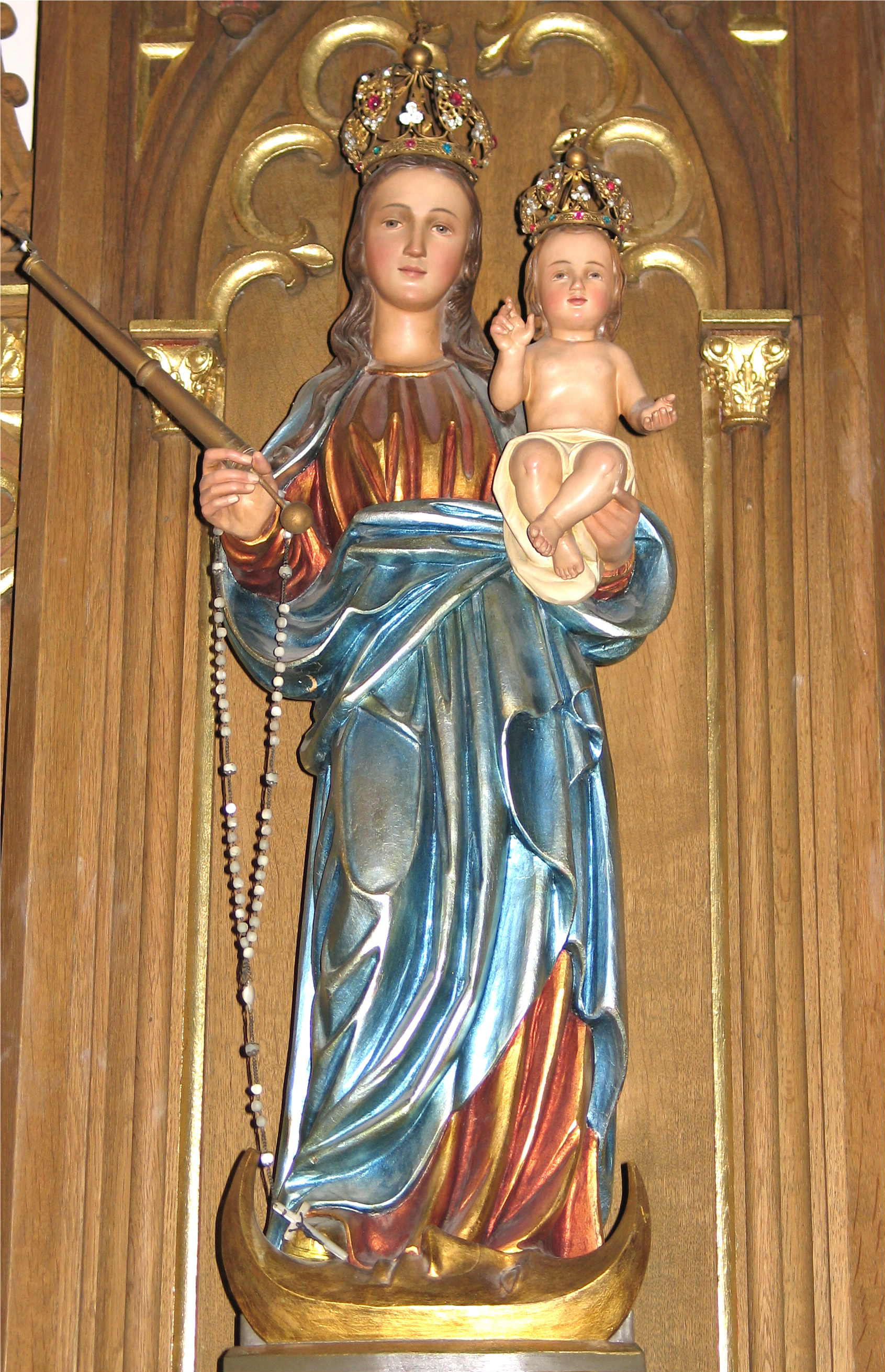 Mariestatu an der Kierch zu Nidderaanwen